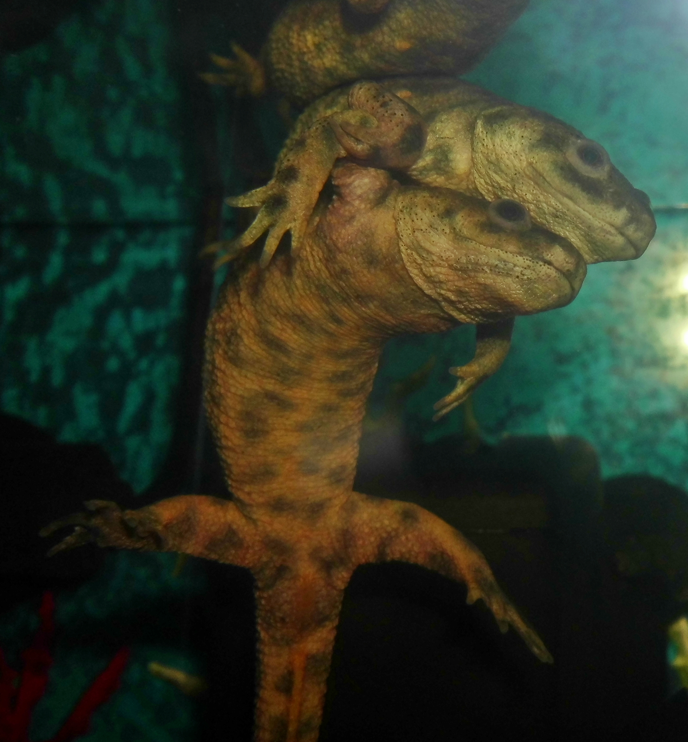 Macho y hembra. Cortejo en cautiverio.